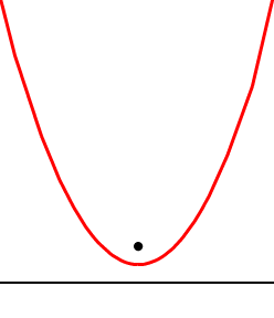 Парабола с её фокусом и директриссой.